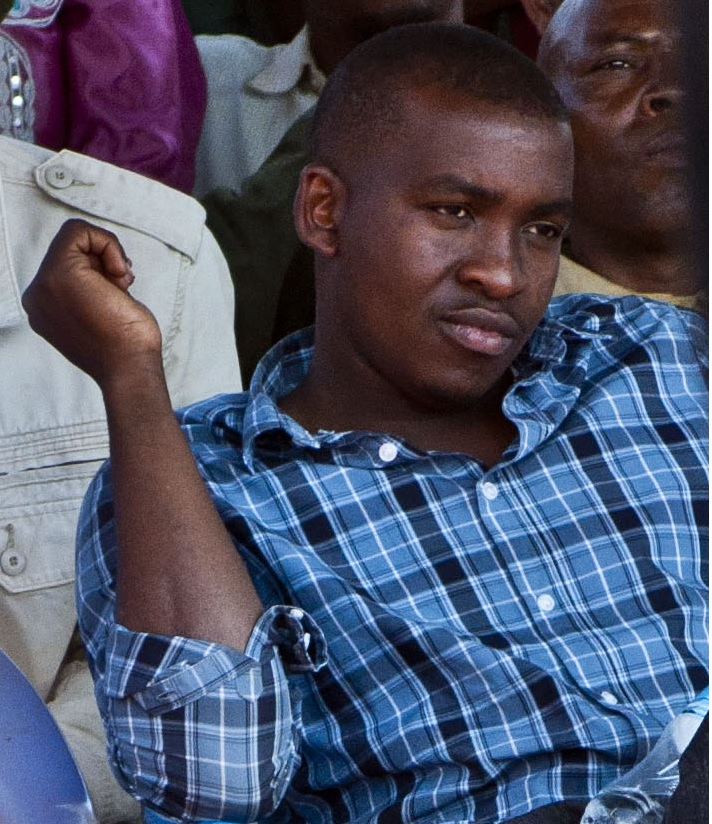 Joshua Nassari